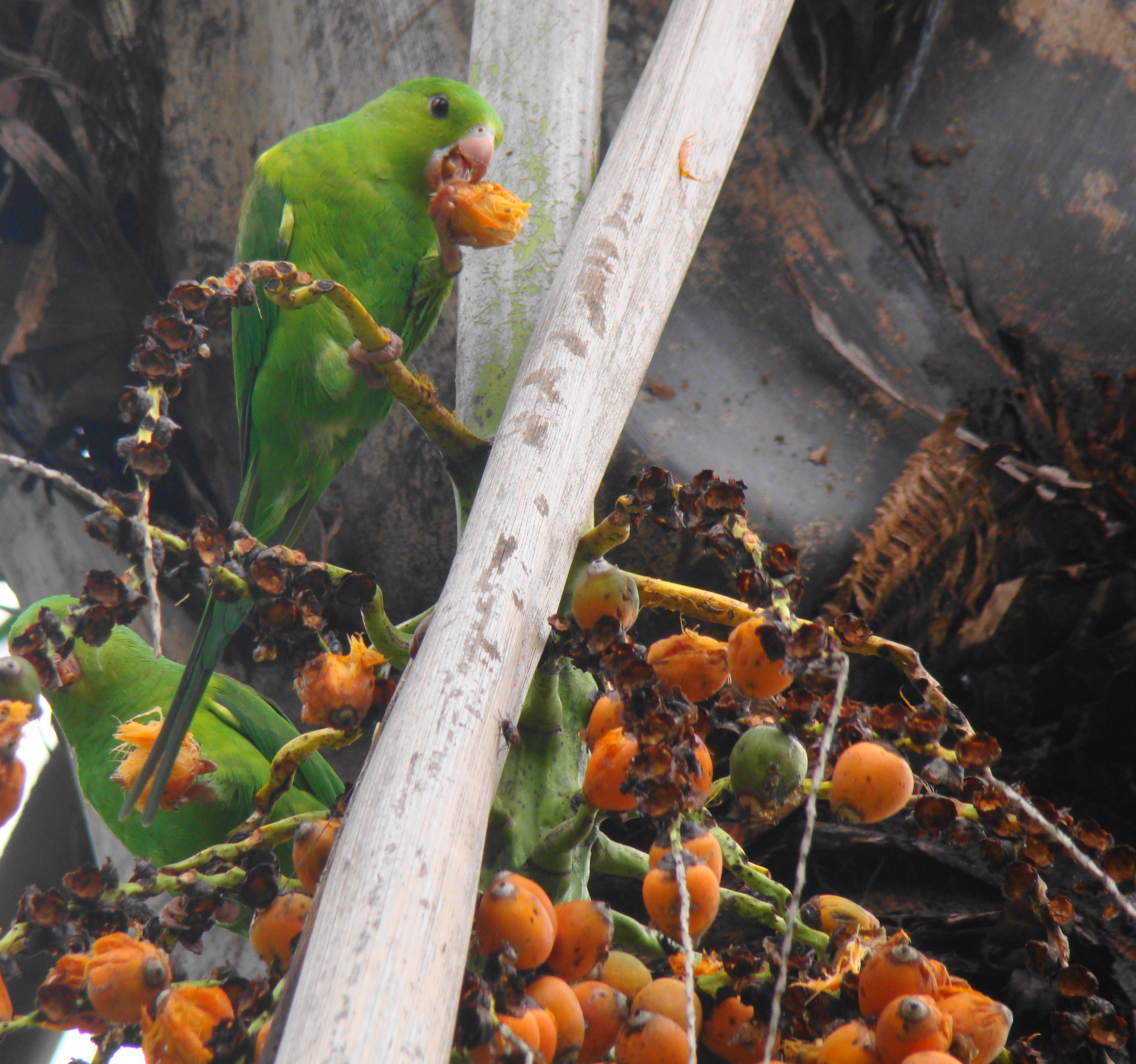 Ceret S�o paulo